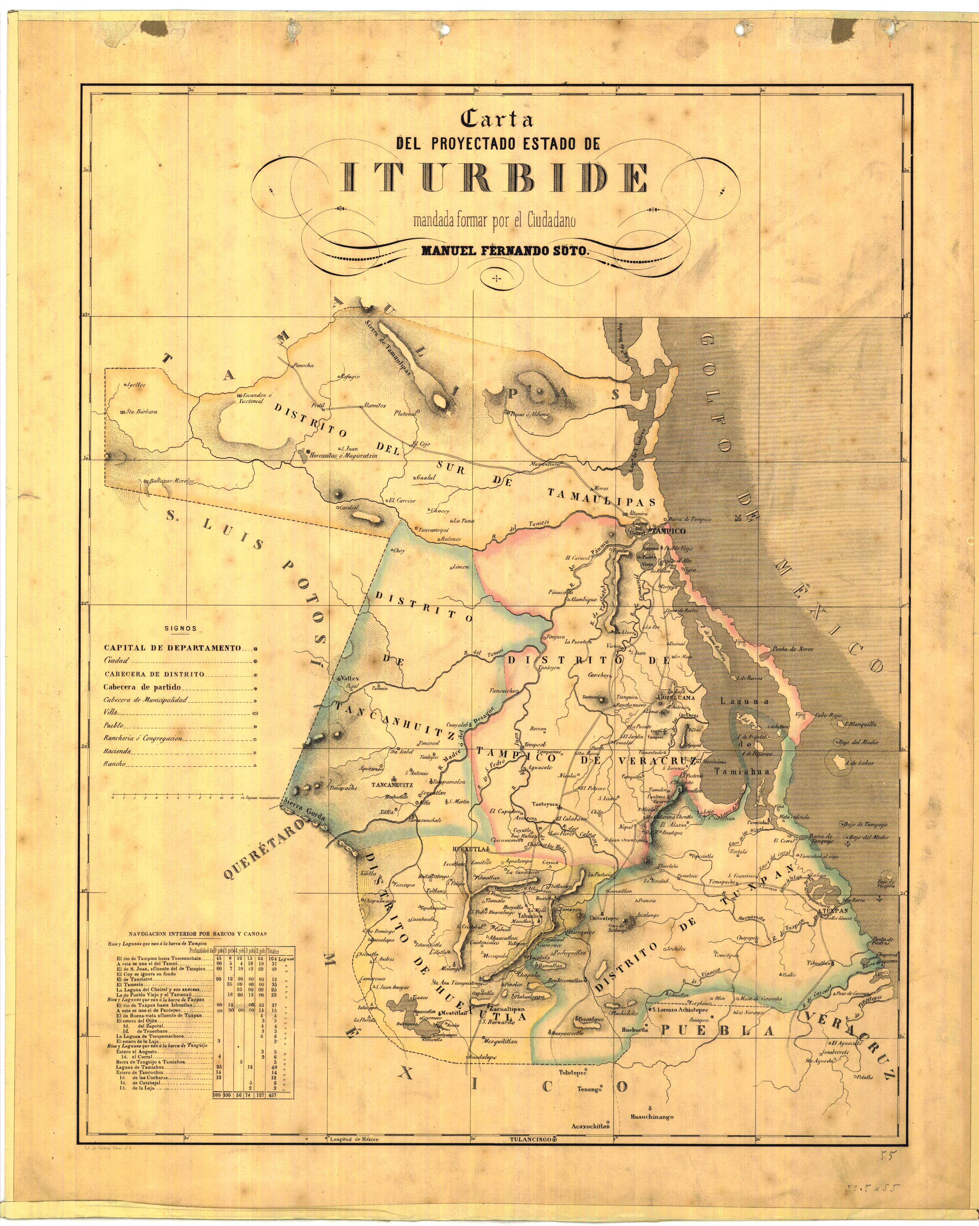 CARTA DEL PROYECTADO ESTADO DE ITURBIDE MANDADA A FORMAR POR EL CIUDADANO MANUEL FERNANDO SOTO Escala LEGUAS MEXICANAS Técnica LITOGRAFIA Medidas 63 x 53 cm